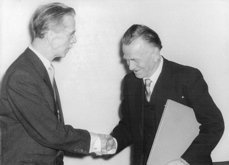 Berlin, Otto Dix-Ausstellung Zentralbild Zimontkowski 12.65.2032 Otto Dix-Ausstellung in Berlin. Die Deutsche Akademie der Künste zu Berlin eröffnet am 12.4.1957 in ihren Räumen eine eindrucksvolle und interessante Kollektivausstellung ihres Mitgliedes, des deutschen Malers Prof. Otto Dix. UBz: Der Präsident der Deutschen Akademie der Künste, Prof. Otto Nagel (links), überreichte am Tage der Eröffnung der Ausstellung Prof. Otto Dix die Ernennungsurkunde zum Korrespondierenden Mitglied der Deutschen Akademie der Künste. Abgebildete Personen: Nagel, Otto Prof.: Maler, Präsident der Akademie der Künste (AdK), Nationalpreisträger, Vaterländischer Verdienstorden (VVO) in Gold, DDR (GND 118586300)